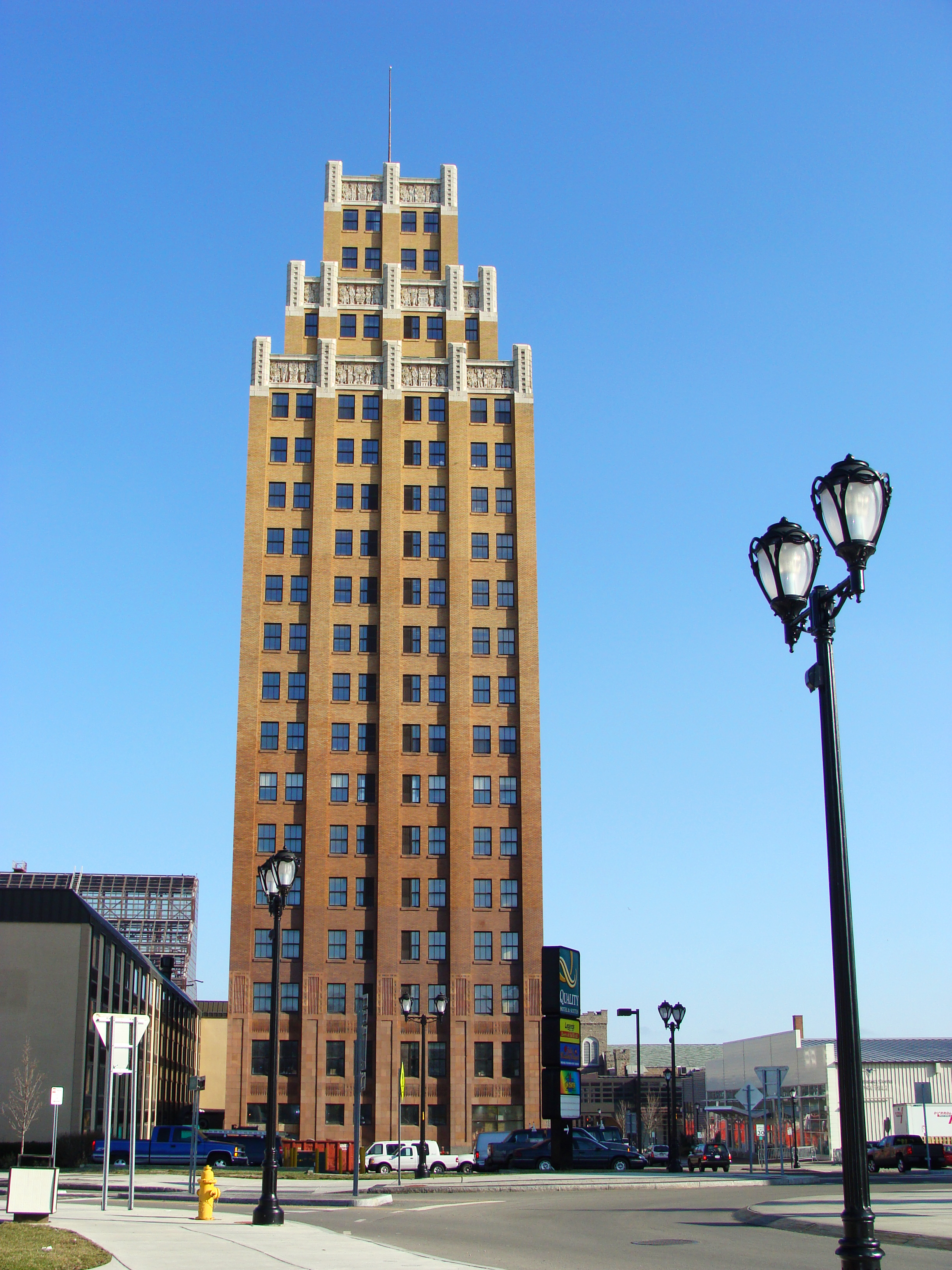 Vereinigte Staaten: Gebäude in Niagara Falls (New York)